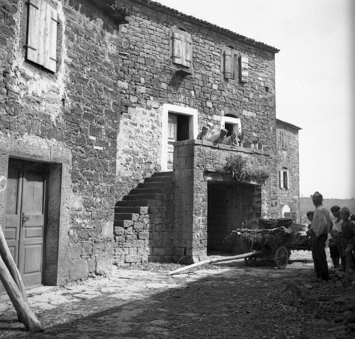 Hiša z "bala(n)durjem, Kućibreg.